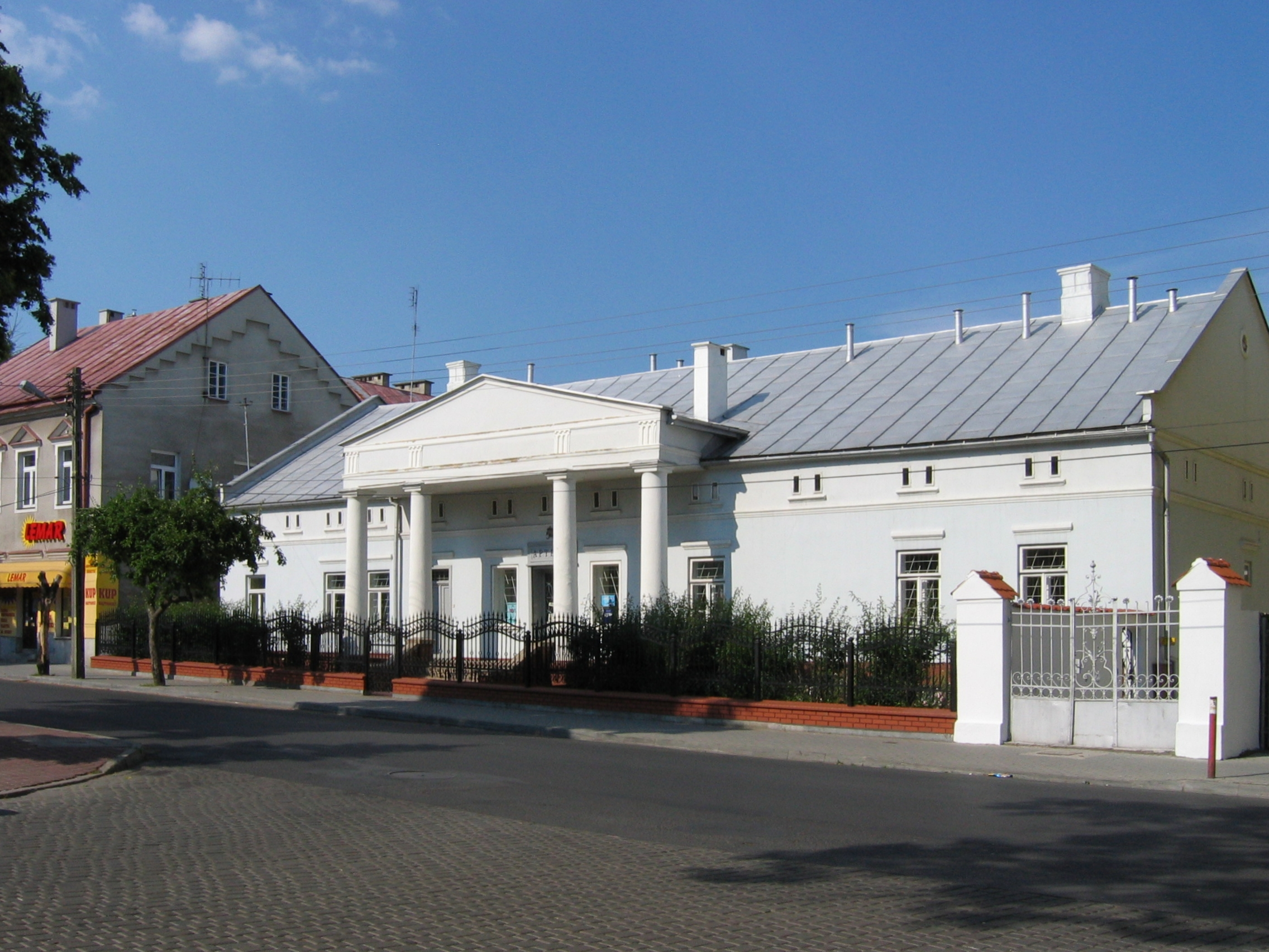 klasycystyczny dworek Suchorzewskich